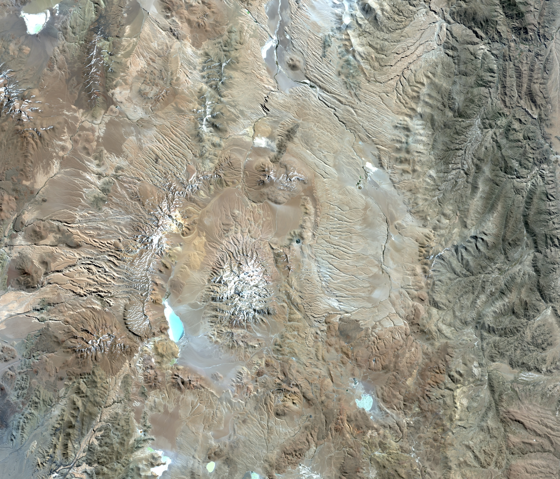 Спутниковый снимок вулкана Серро-Галан. Снимок спутника Landsat 8, обработка в ArcMap 10.2